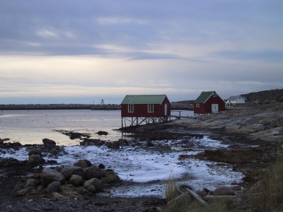 From Osen, Sør-Trøndelag, Norway.